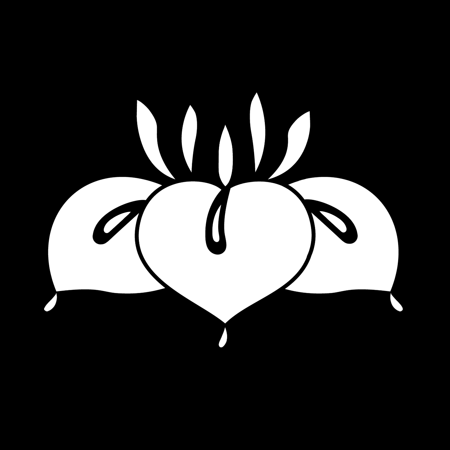 「杜若」紋（染抜）